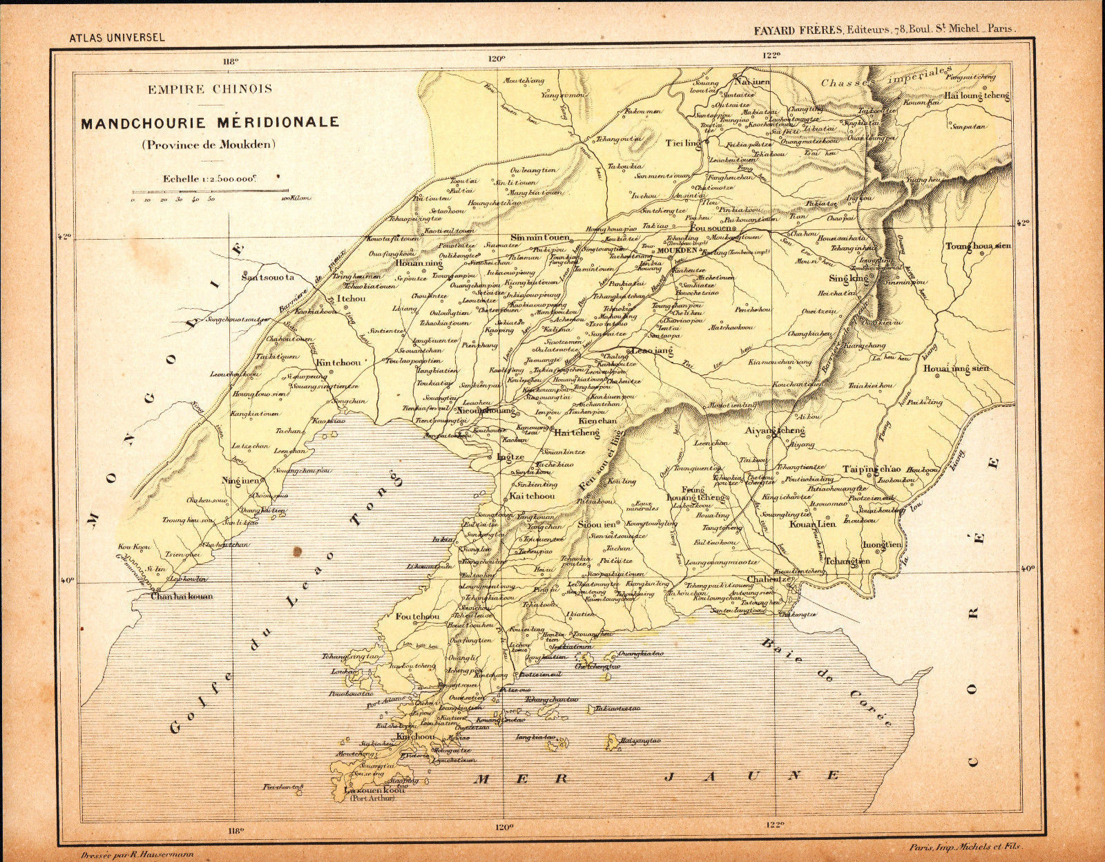 Carte de Mandchourie méridionale. Début XXe siècle.